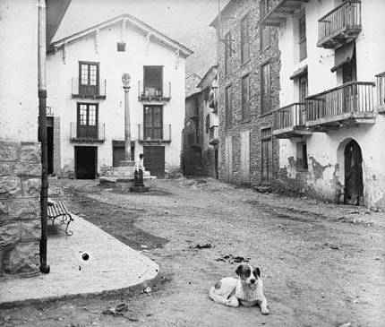 Imatge